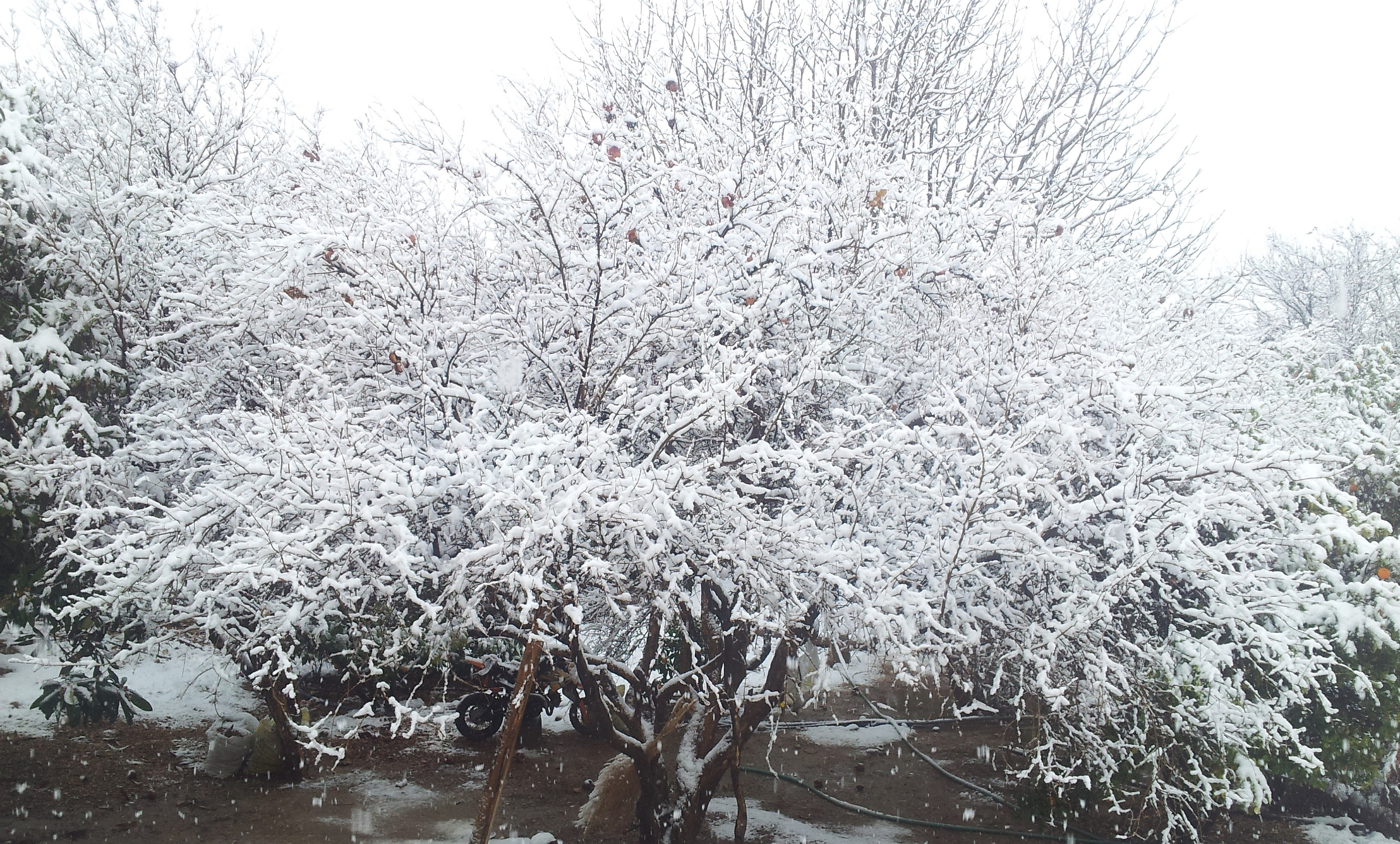 زمستان ۱۳۹۲ در کیان آباد